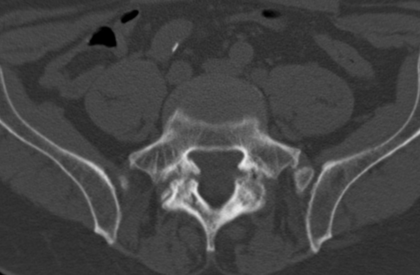 Spondylolyse in der Computertomographie axial L5/S1.